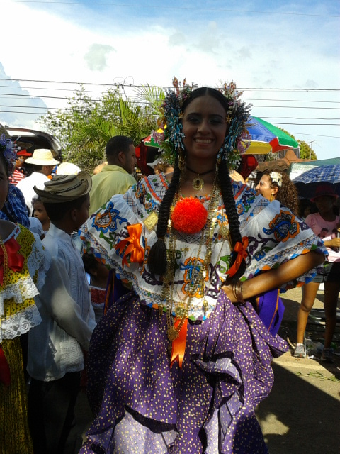 Pollera Montuna elaborada con tela de zaraza de color morado y camisa con tonos morados en Talco, con encajes y calados